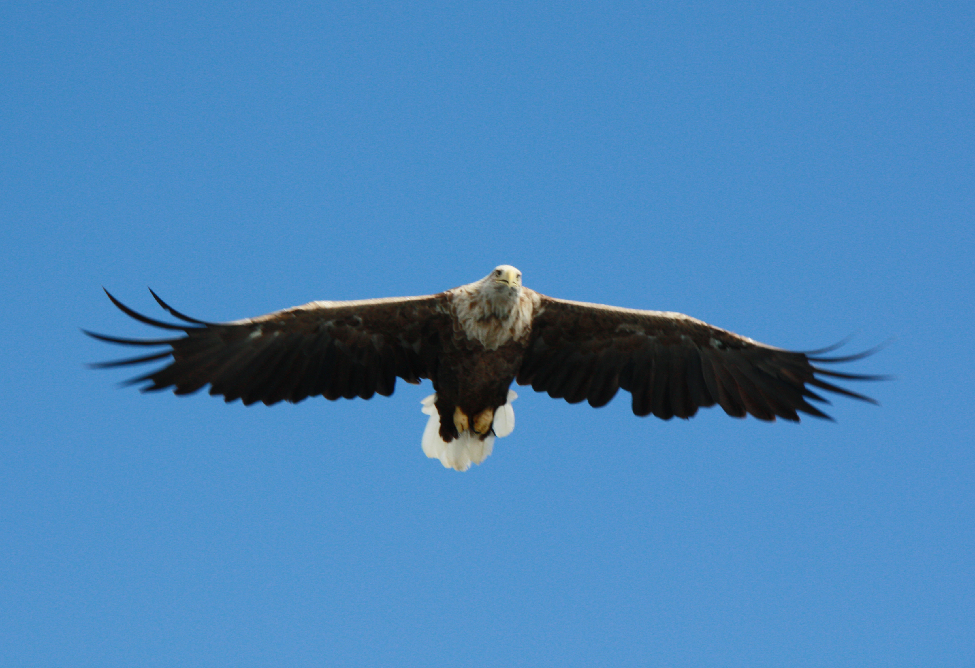 Havørn i Øyhellesundet utenfor Svolvær